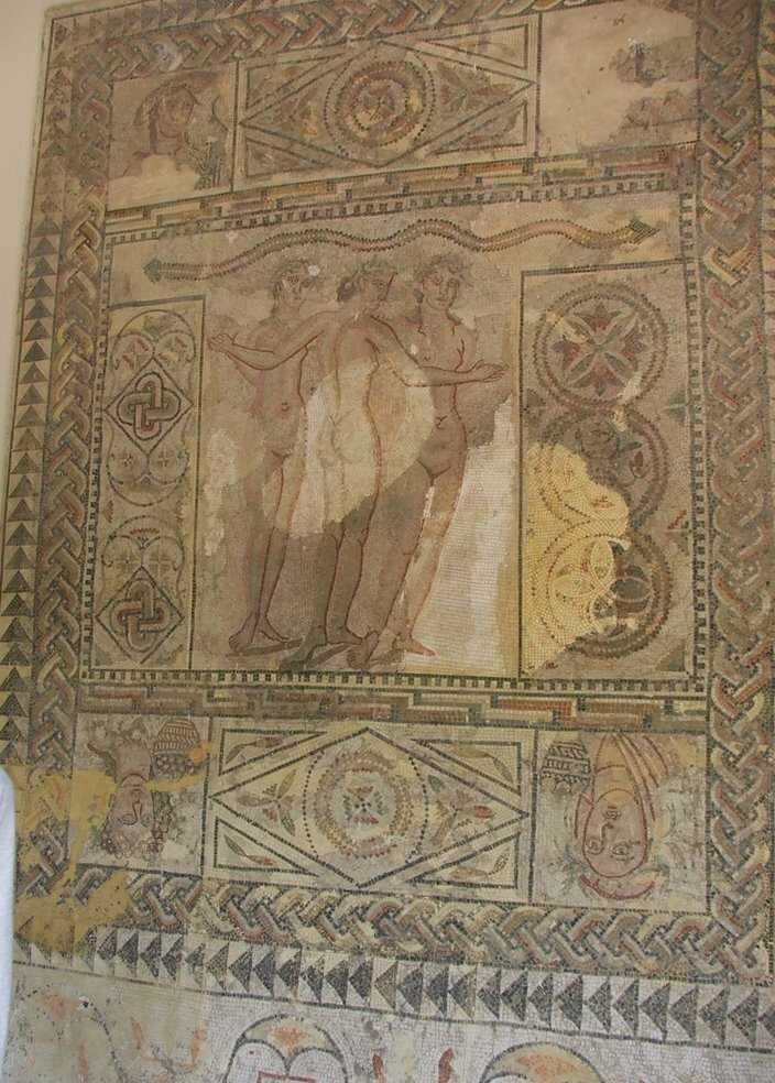 Mosaico romano representando las Tres Gracias procedente de Lixus en el Museo Arqueológico de Tetuán